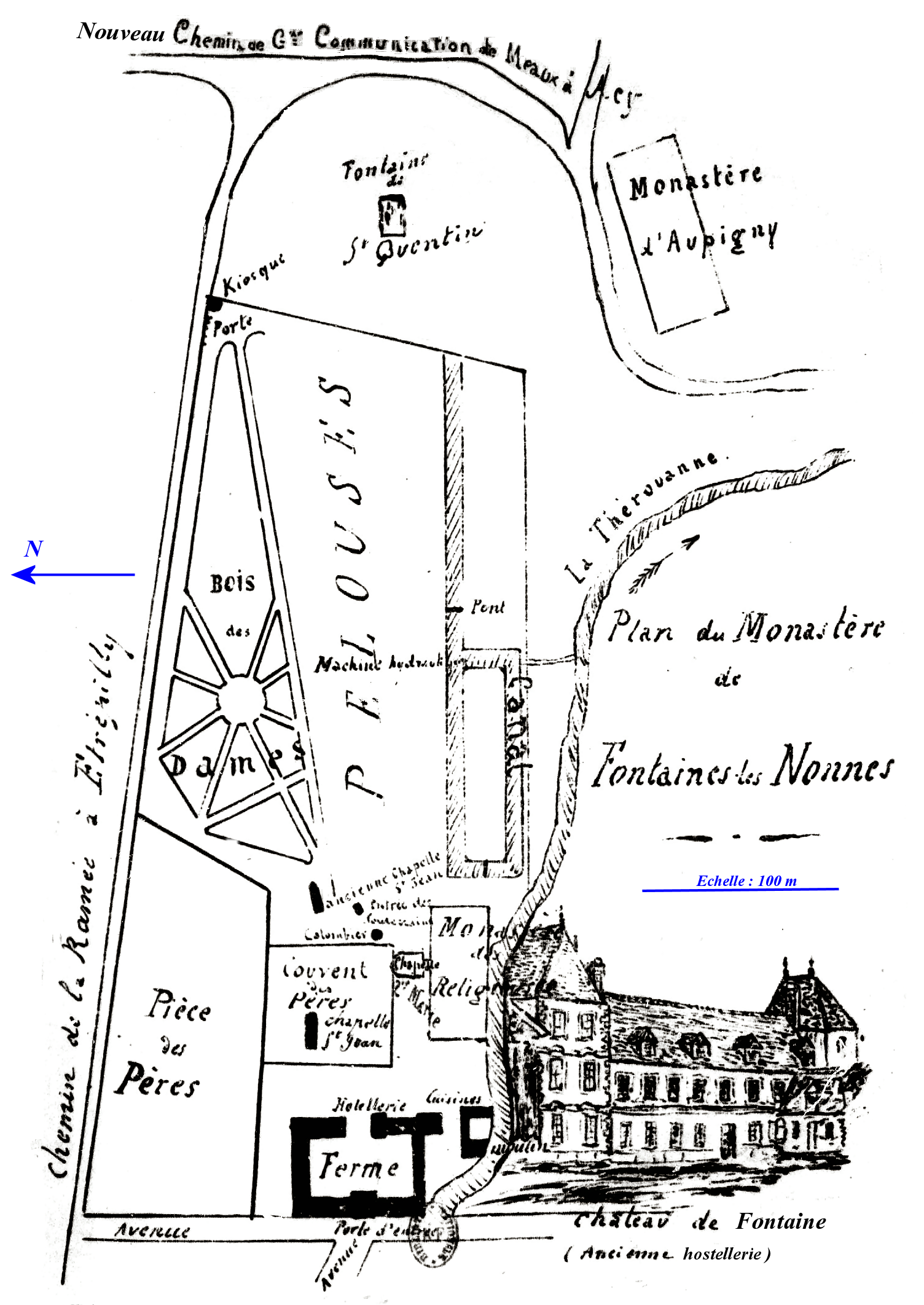 Plan supposé du prieuré.